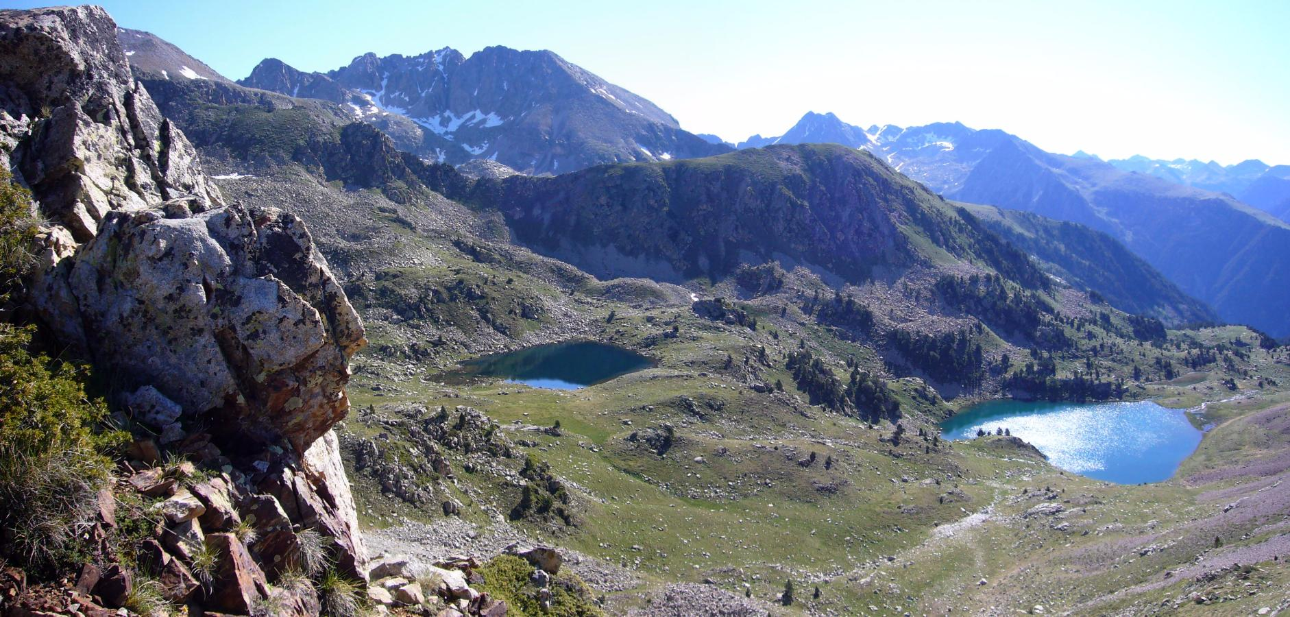 Estanys Roi de Dalt i Roi vistos des de la Collada de Fenerui; la Vall de Boí, Alta Ribagorça, Catalunya